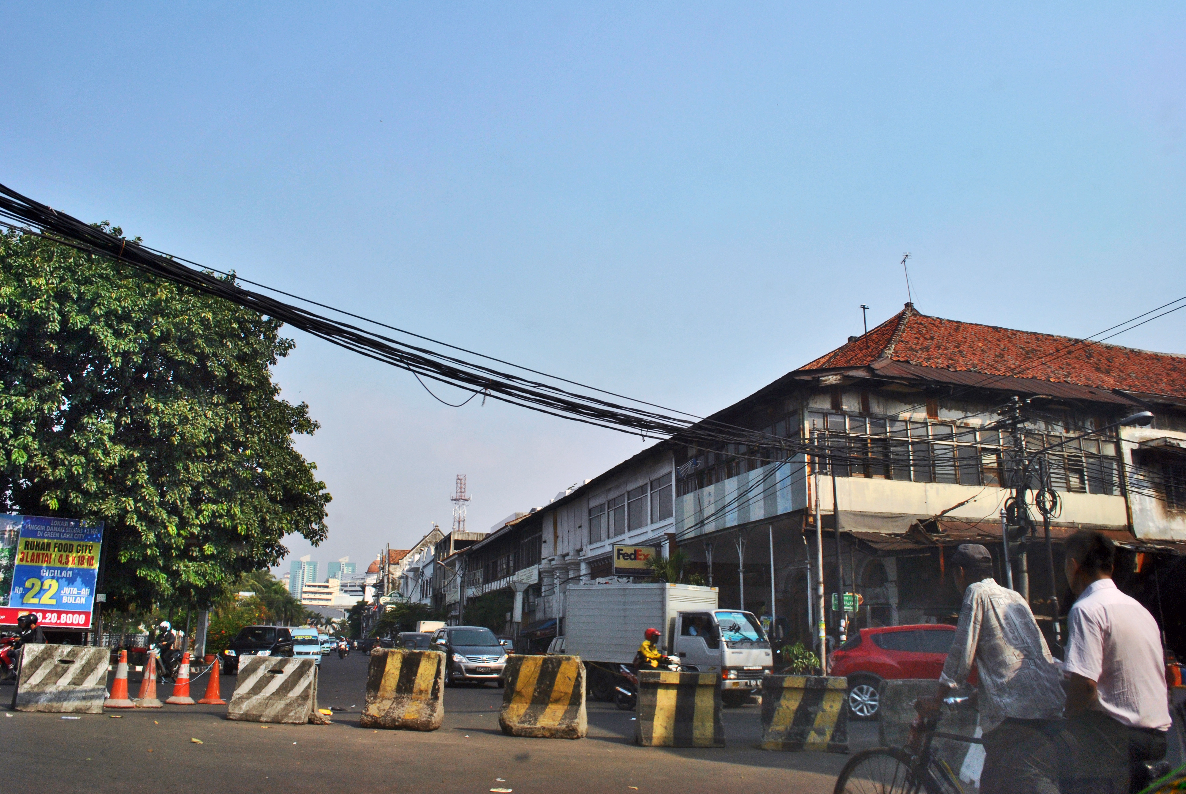 West Jakarta, West Jakarta City, Special Capital Region of Jakarta, Indonesia